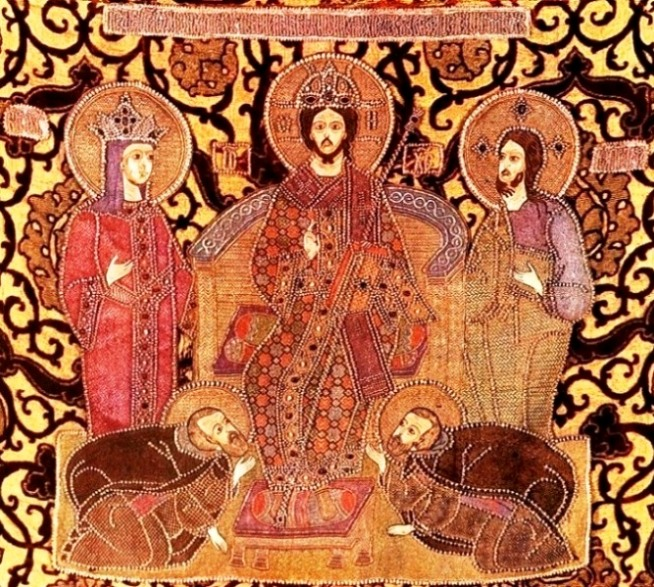 Индития "Предста Царица одесную тебе", работа приписываемая царевне Ксении Годуновой